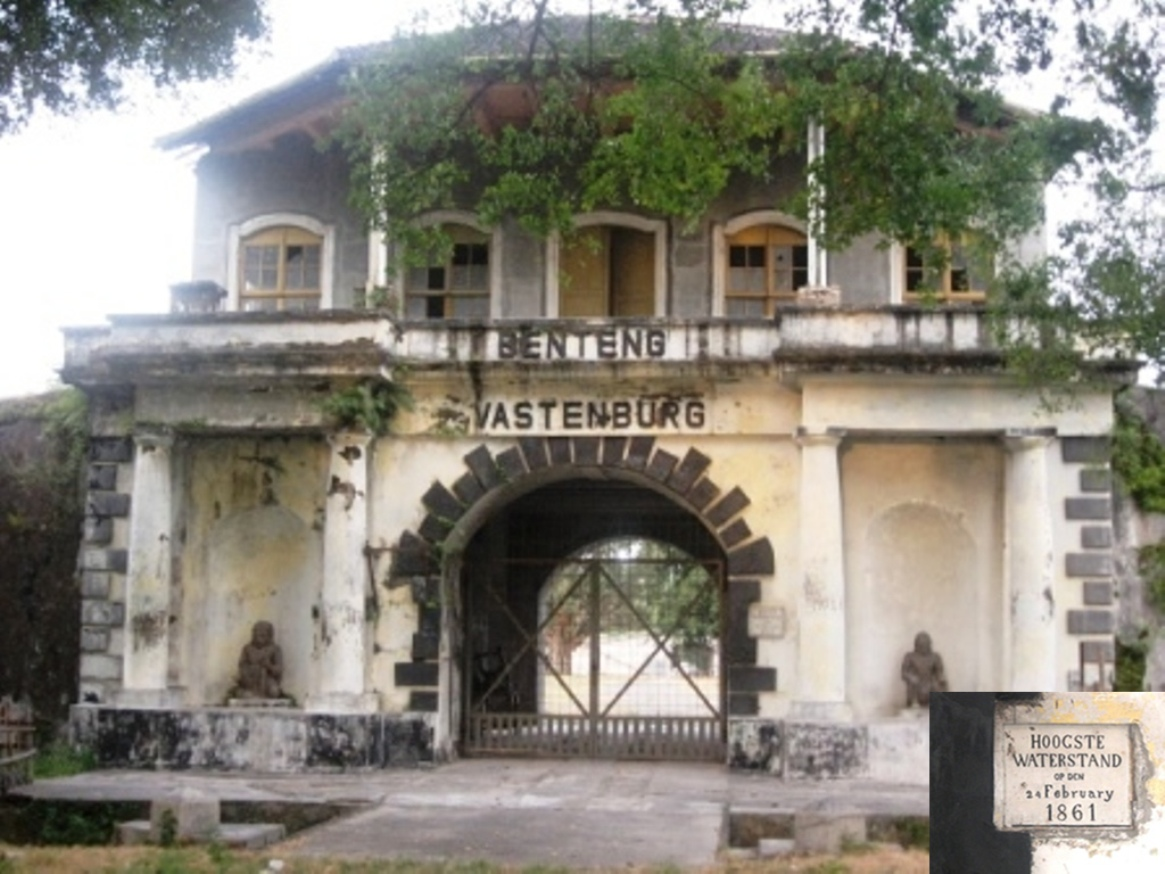 benteng vastenberg solo indonesia